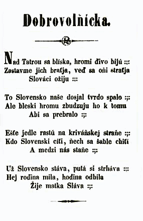 Nad Tatrou sa blyska, Domova pokladnica, 1851